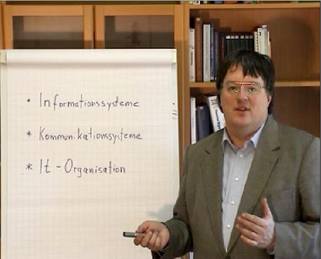 Prof. Dr. Helge Klaus Rieder, Professor für Wirtschaftsinformatik an der Fachhochschule Trier (Erlaubnis per E-Mail erteilt)